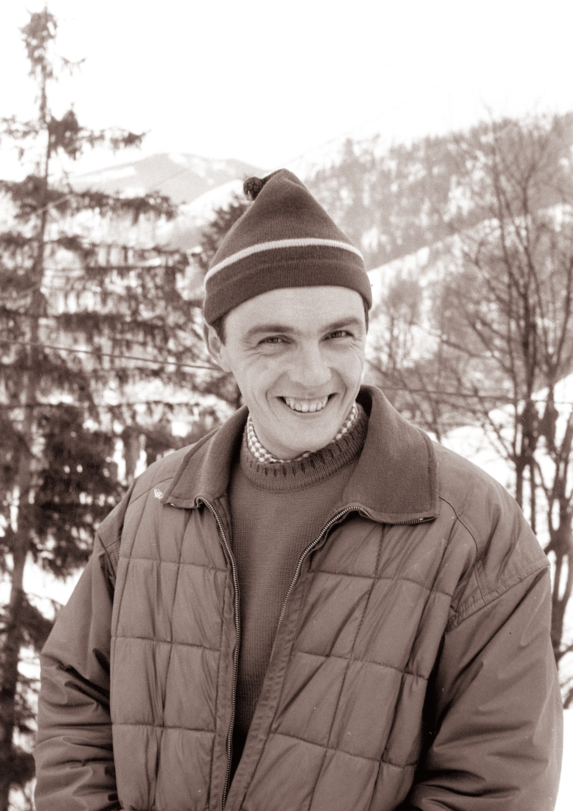 Jože Šlibar